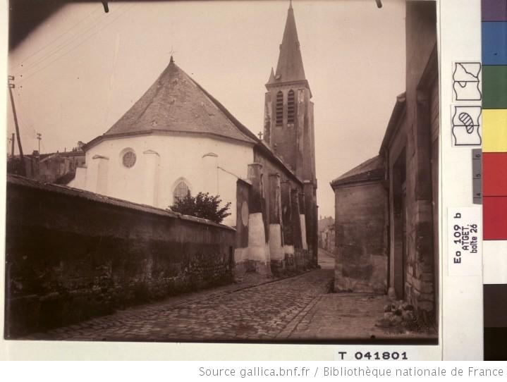 Stains [Eglise Notre-Dame-de-l'Assomption]. N ° Atget : 7121. 1925-1927. Photographie positive sur papier aristotype d'après négatif sur verre au gélatinobromure ; 17,8 x 23,2 cm (épr.). [Cote : BNF - Est. Eo 109b bte 26 ; n ° micr. T041801] \ O